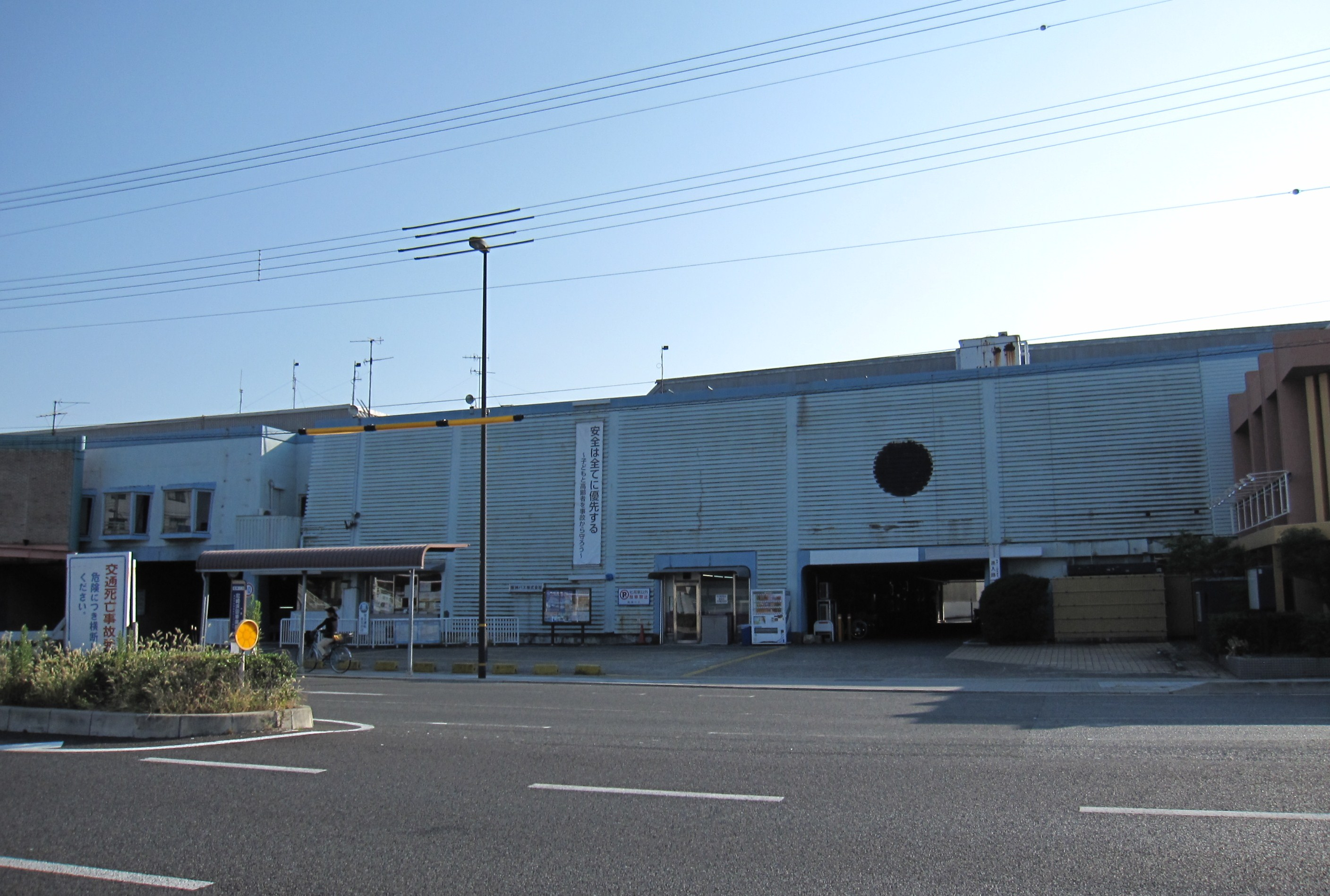 阪神バス本社